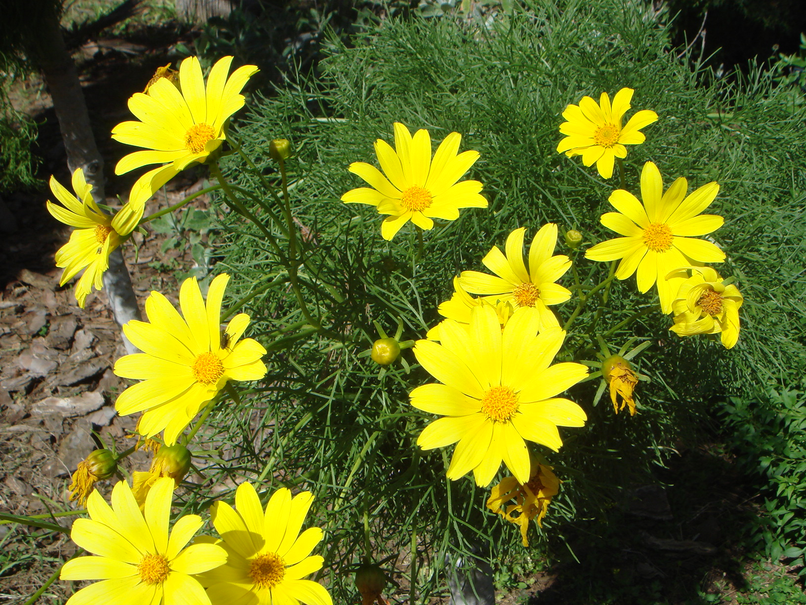 Coreopsis gigantea,Jardín Botánico de San Fernando, Cádiz, España. Planta originaria de California e Isla de Guadalupe.